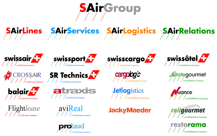 Logos der verschiedenen Firmen der SAirGroup